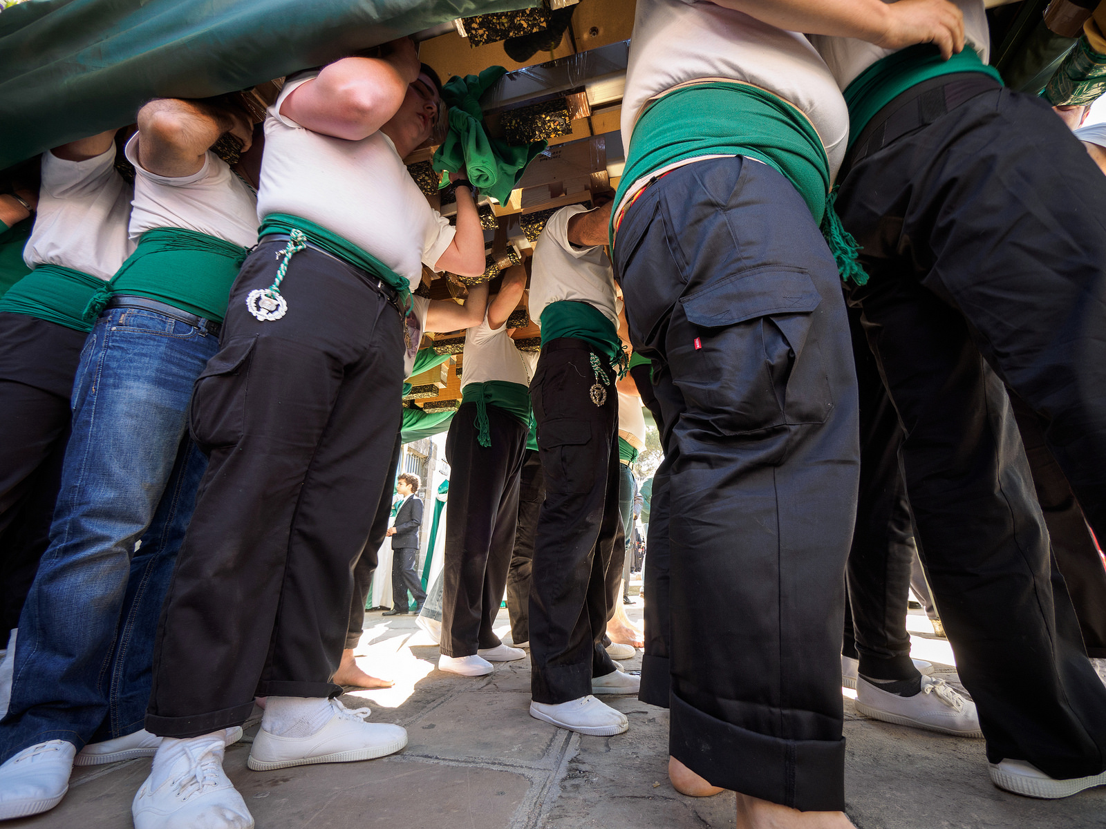 Cargadores del palio de "La Borriquilla" a la salida de la procesión el Domingo de Ramos del año 2016